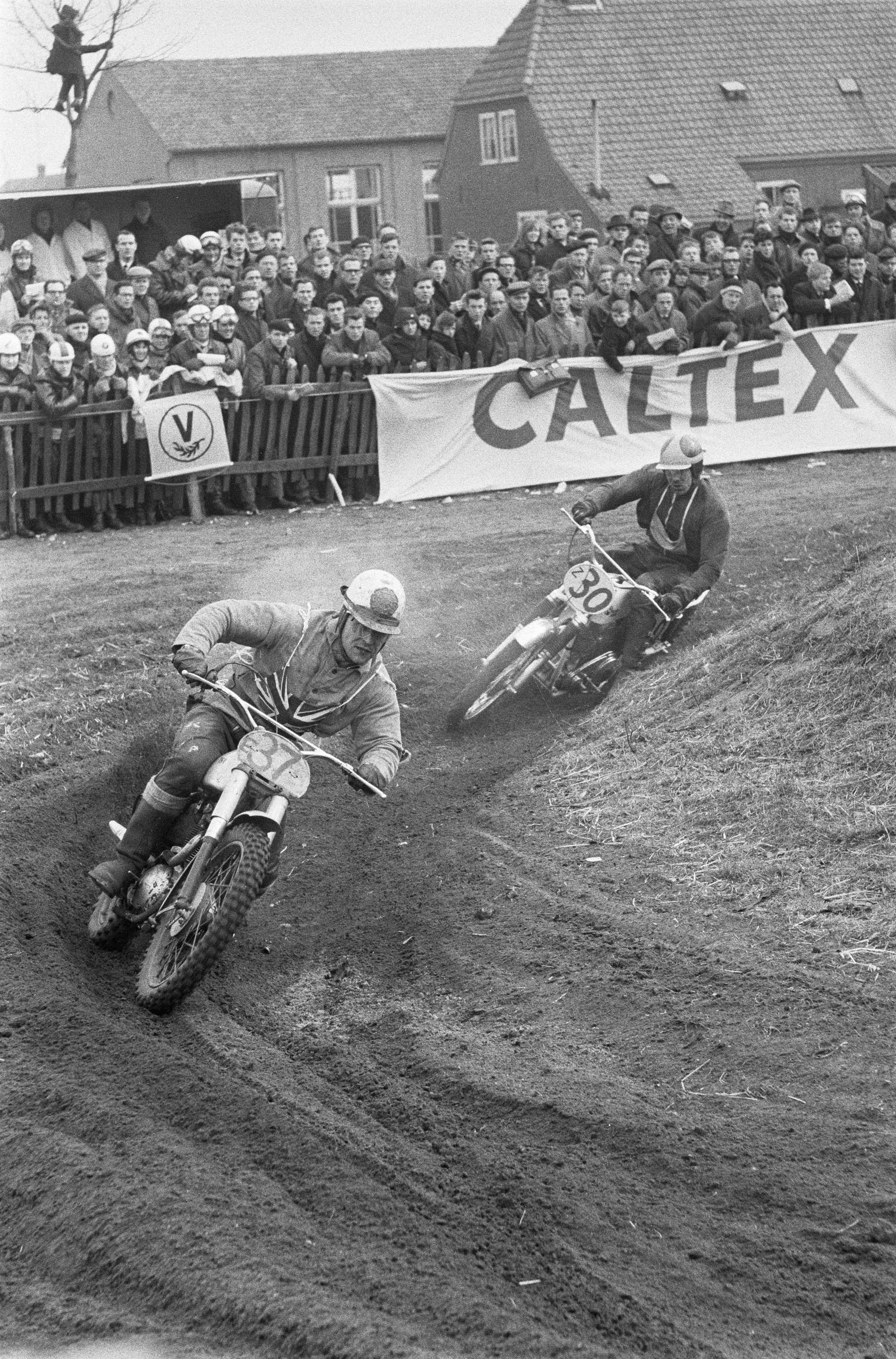 Collectie / Archief : Fotocollectie Anefo Reportage / Serie : [ onbekend ] Beschrijving : Internationale motorcrosswedstrijden in Sint Antons bij 500cc no. 37 Jeff Smith voorop en daarachter Rolff Tibblin Datum : 15 maart 1964 Trefwoorden : MOTORCROSS Fotograaf : Pot, Harry / Anefo Auteursrechthebbende : Nationaal Archief Materiaalsoort : Negatief (zwart/wit) Nummer archiefinventaris : bekijk toegang 2.24.01.05 Bestanddeelnummer : 916-1771